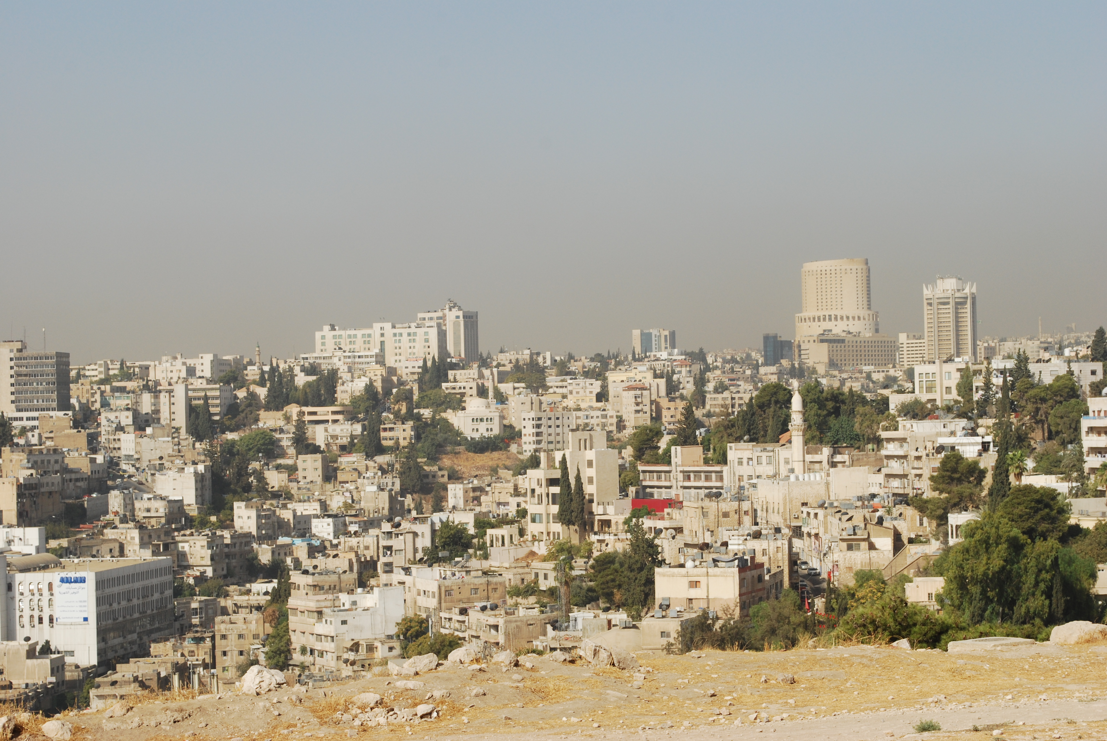 Citadelle d'Amman : panorama de la ville.